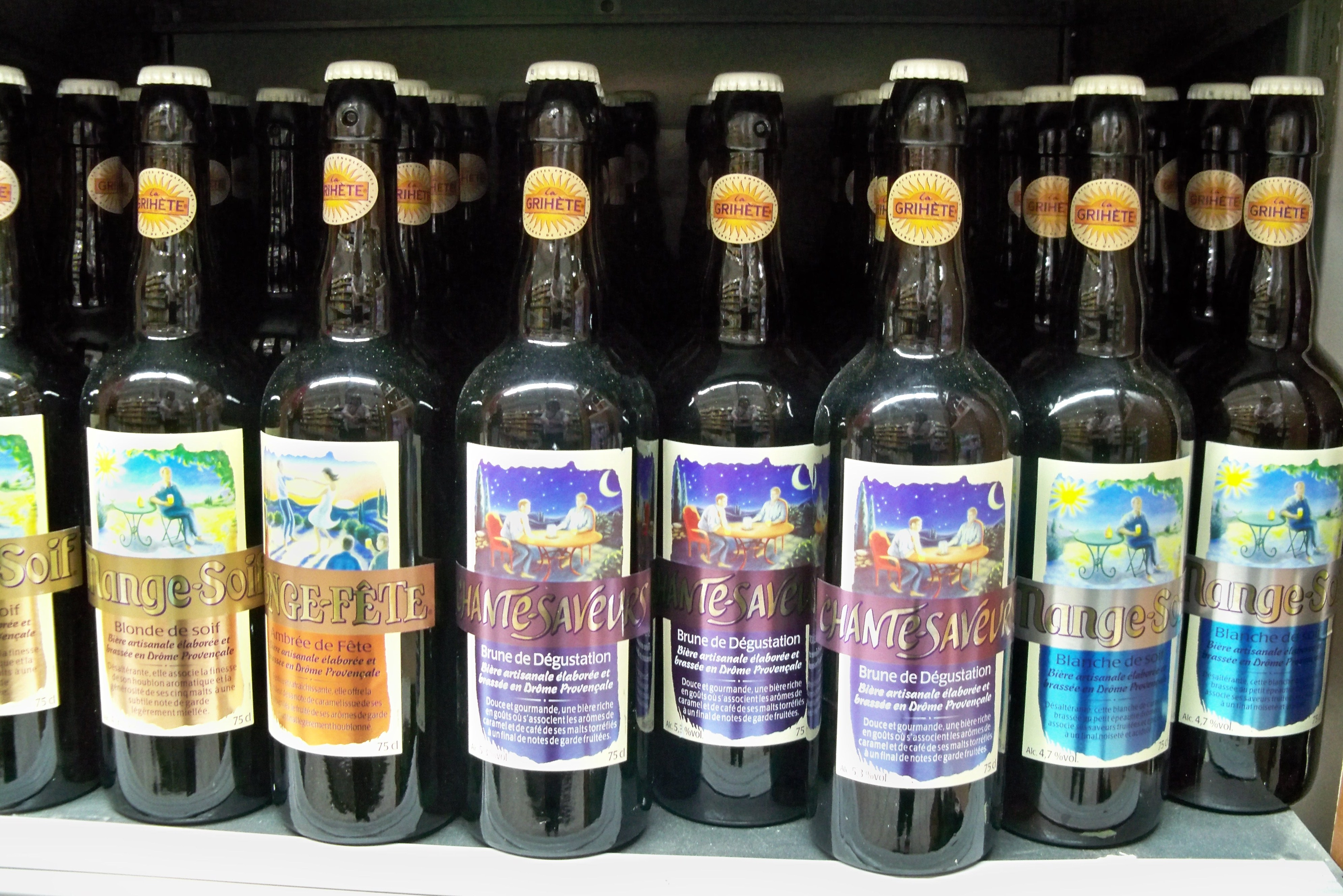 divers bières de la Drôme